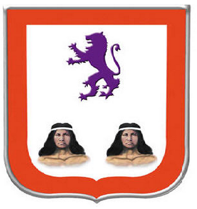 Escudo Ayuntamiento Higuey